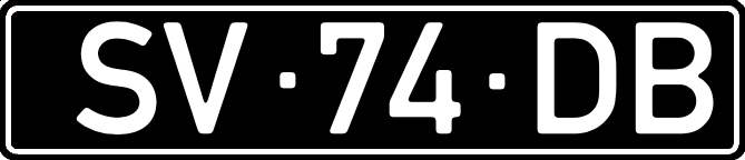 Номерний знак Кабо-Верде